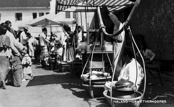 Penjual dawet pikulan di suatu pasar di Malang, Jawa Timur